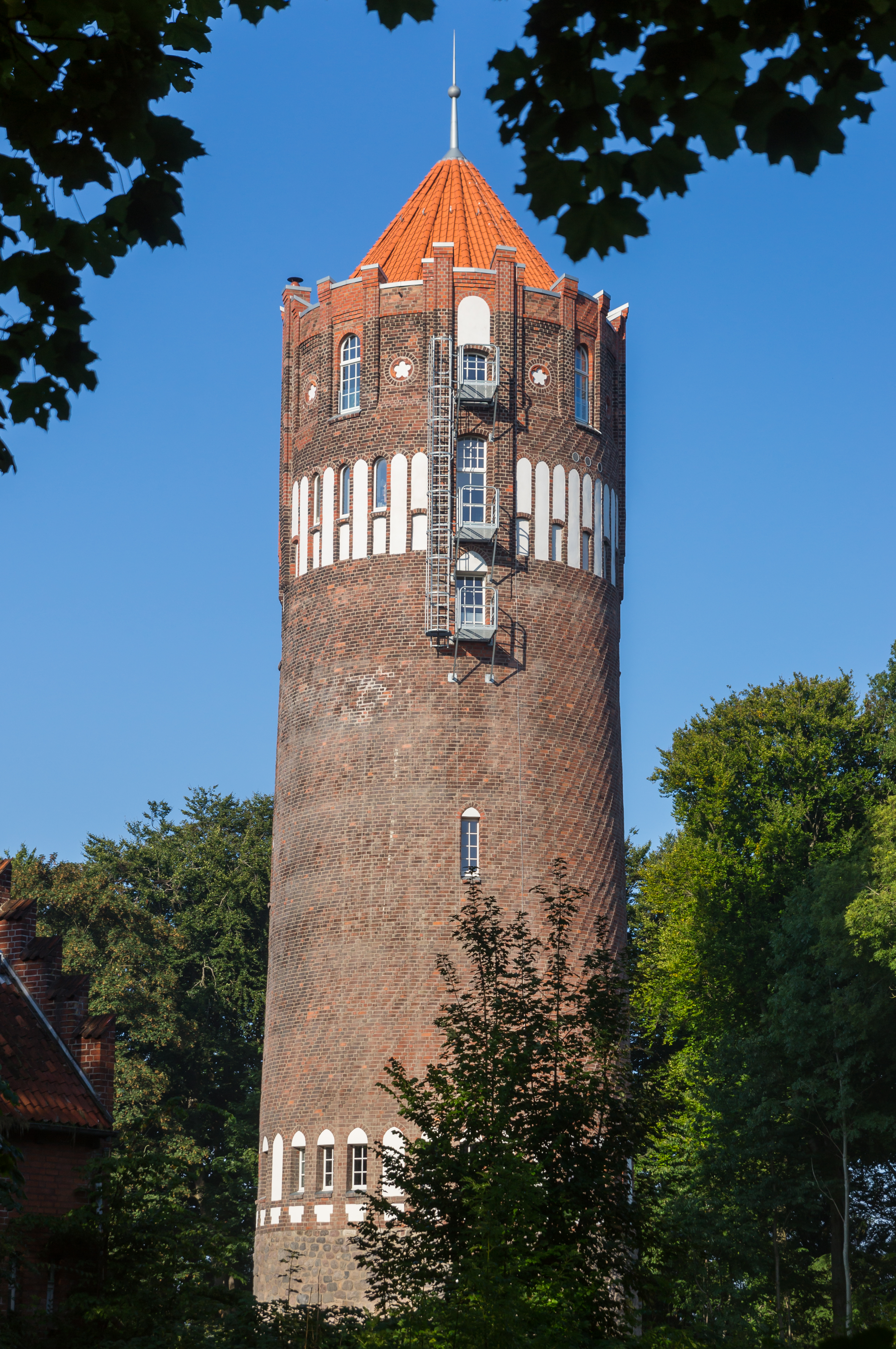 Flensburg-Mürwik, Kelmstraße 29, Wasserturm der Marineschule Mürwik, Denkmal-Nr. 11. Der Turm wurde 2010 saniert und zu einem Wohnhaus umgebaut - seit ca. November 2011 bewohnt.